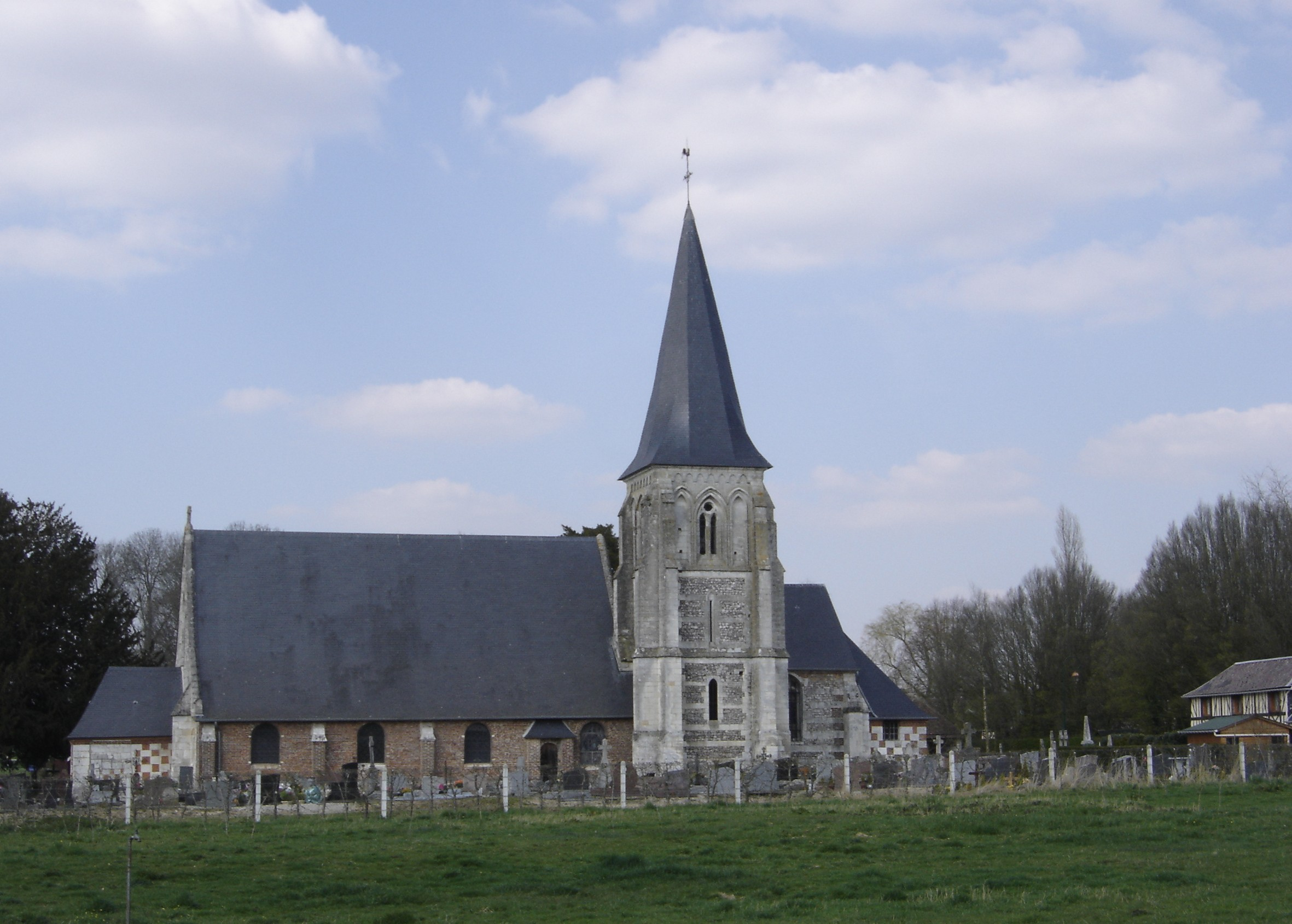 Eglise de la Haye-Aubrée - Eure - France